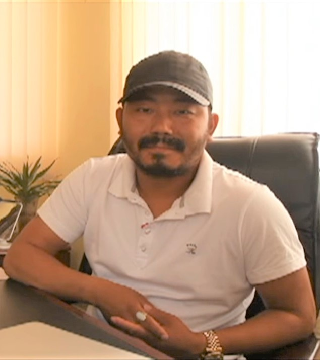 नेपाली: देशलाई बिश्वो सामु चिनाउने चलचित्र बनाउने इच्छा छ | Milan chams @ Filmy गफ गाफ